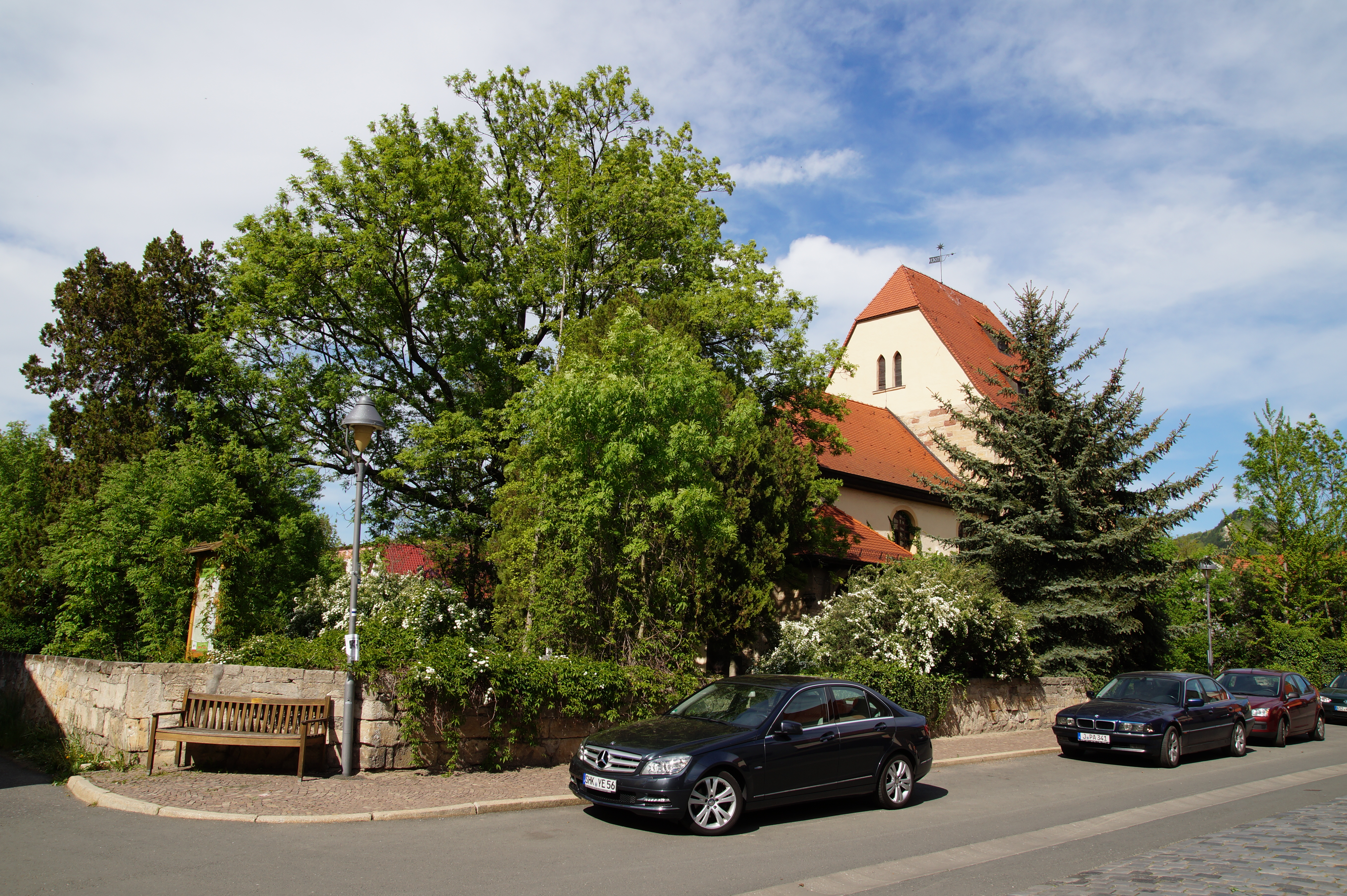 Schillerkirche im Jenaer Ortsteil Wenigenjena